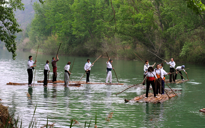 Maderada. Fiesta de Cofrentes mayo.